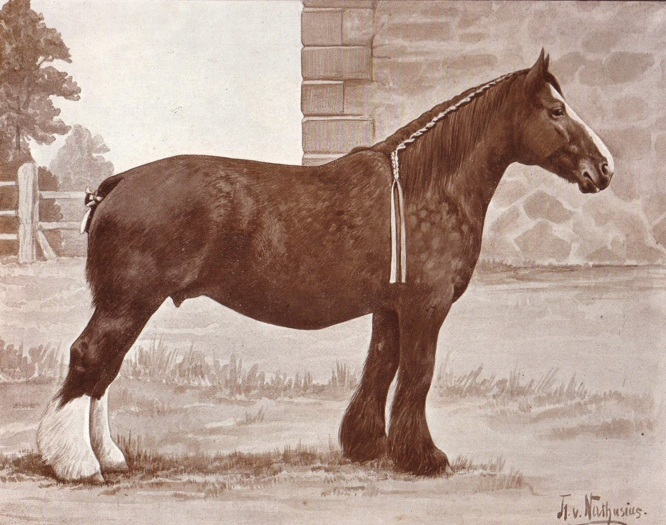 Shire, braune Stute "Dunsmore Gloaming", geb. 1890 in Childwick, England